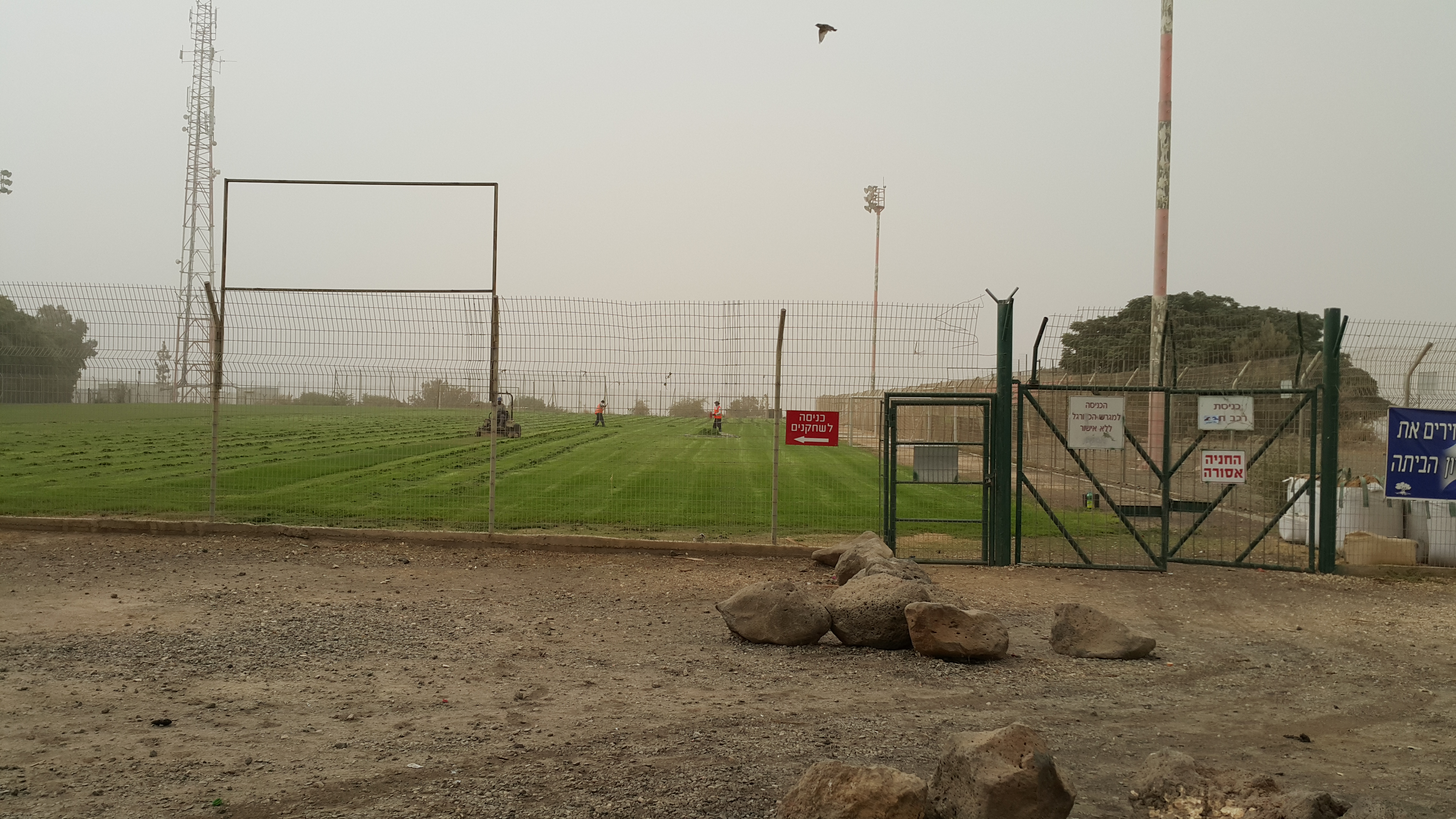 שתילת דשא במגרש